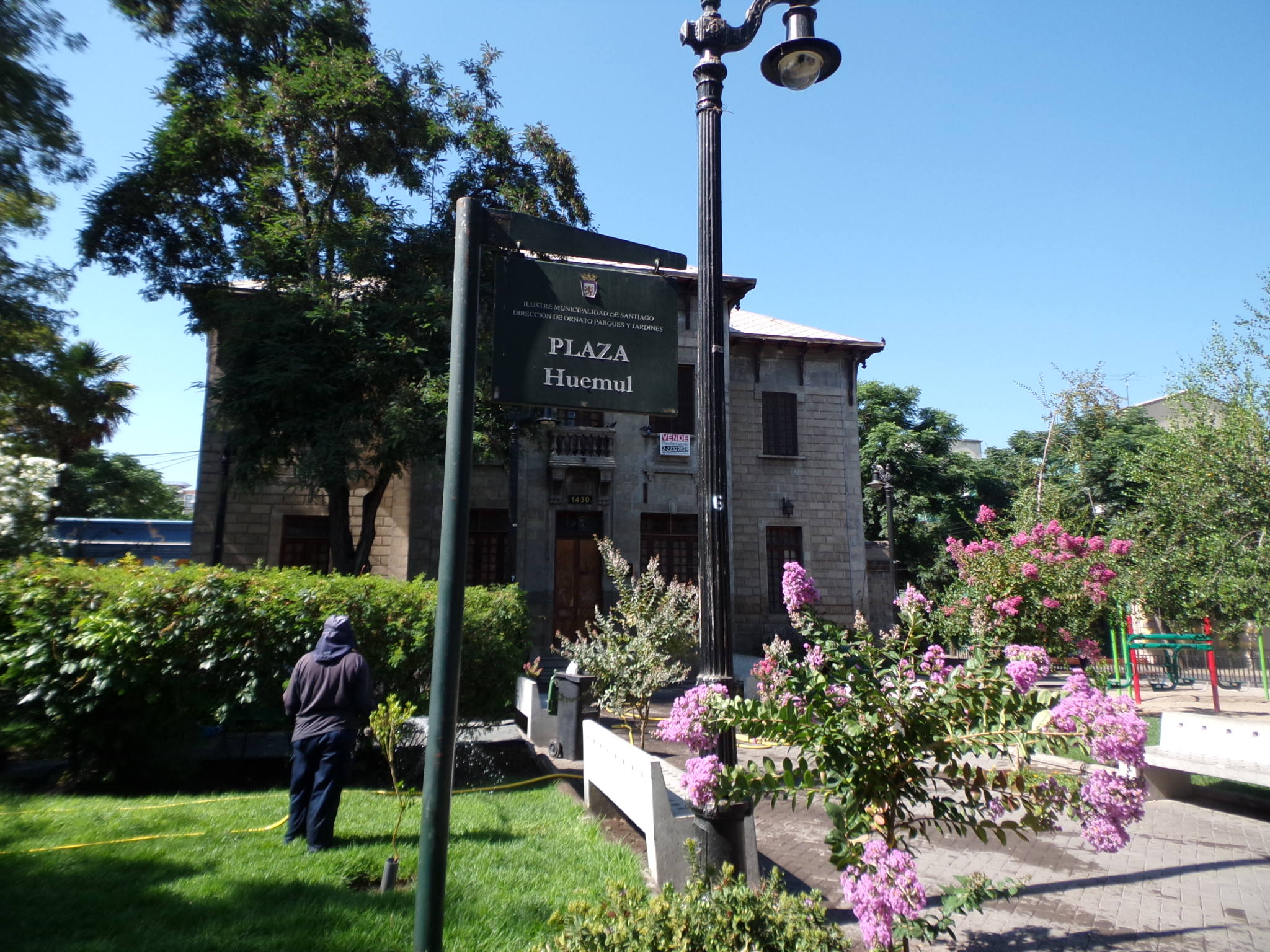 Plaza en cuyo alrededor se construyen principales edificios del barrio; entre otros el Teatro Huemul, señalado como el pequeño municipal